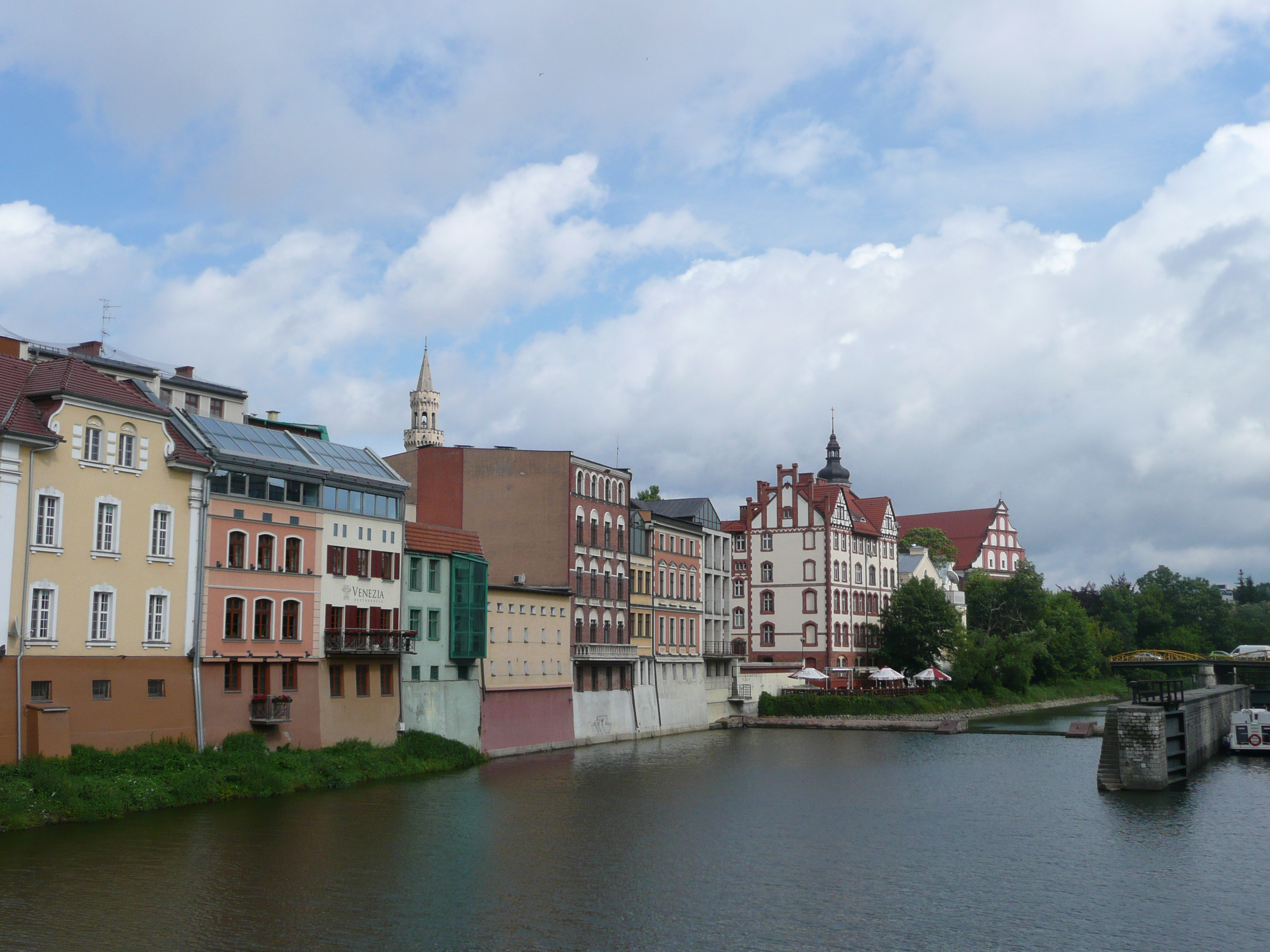 Partie am Mühlgrabe Opole